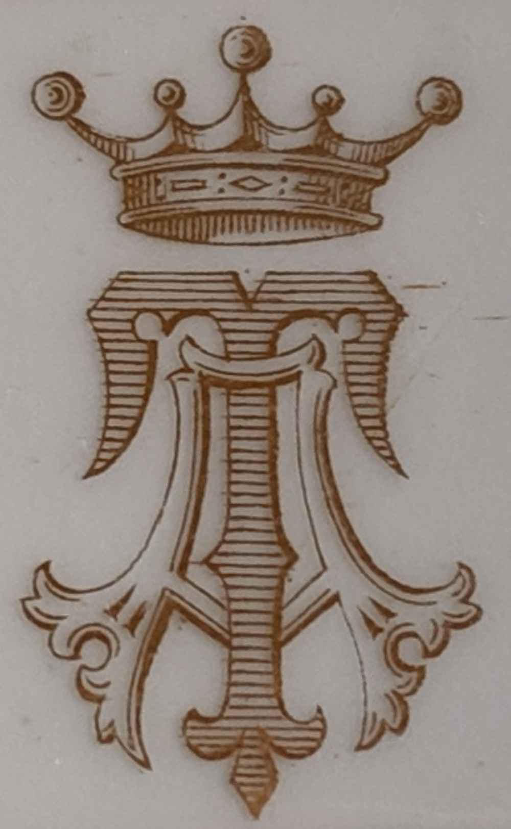 Escudo Vizcondado Torre de Albarragena. Al timbre, corona de vizconde